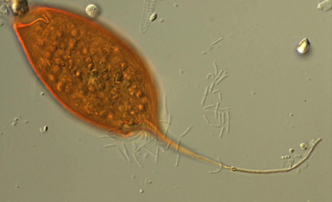 So called euglenid flagellate